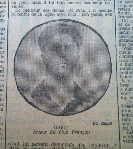 Raymond-Pierre GIGOT équipe de France de Football 1910